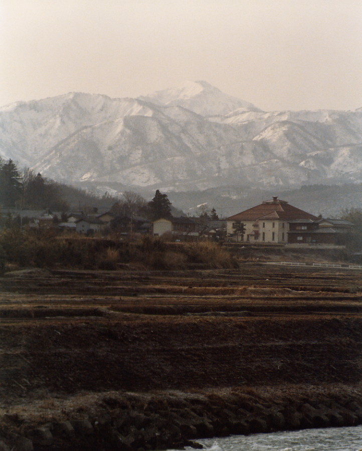 大門山と旧浅川村村役場（金沢市浅川出張所)